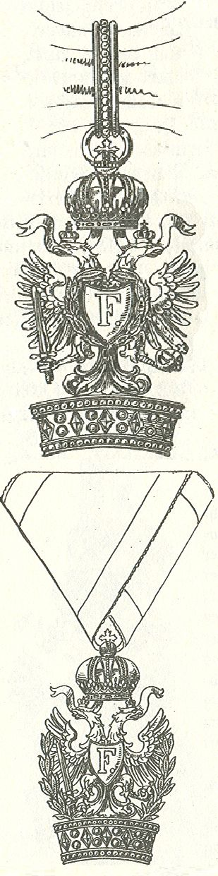 Scan van Blz. 278 van het boek "Handbuch der Ritter- und Verdienstorden " uitgegeven 1893 door Weber.Tekening van de in 1902 overleden Maximilian Gritzner. Robert Prummel 10 jul 2008 16:40 (CEST)